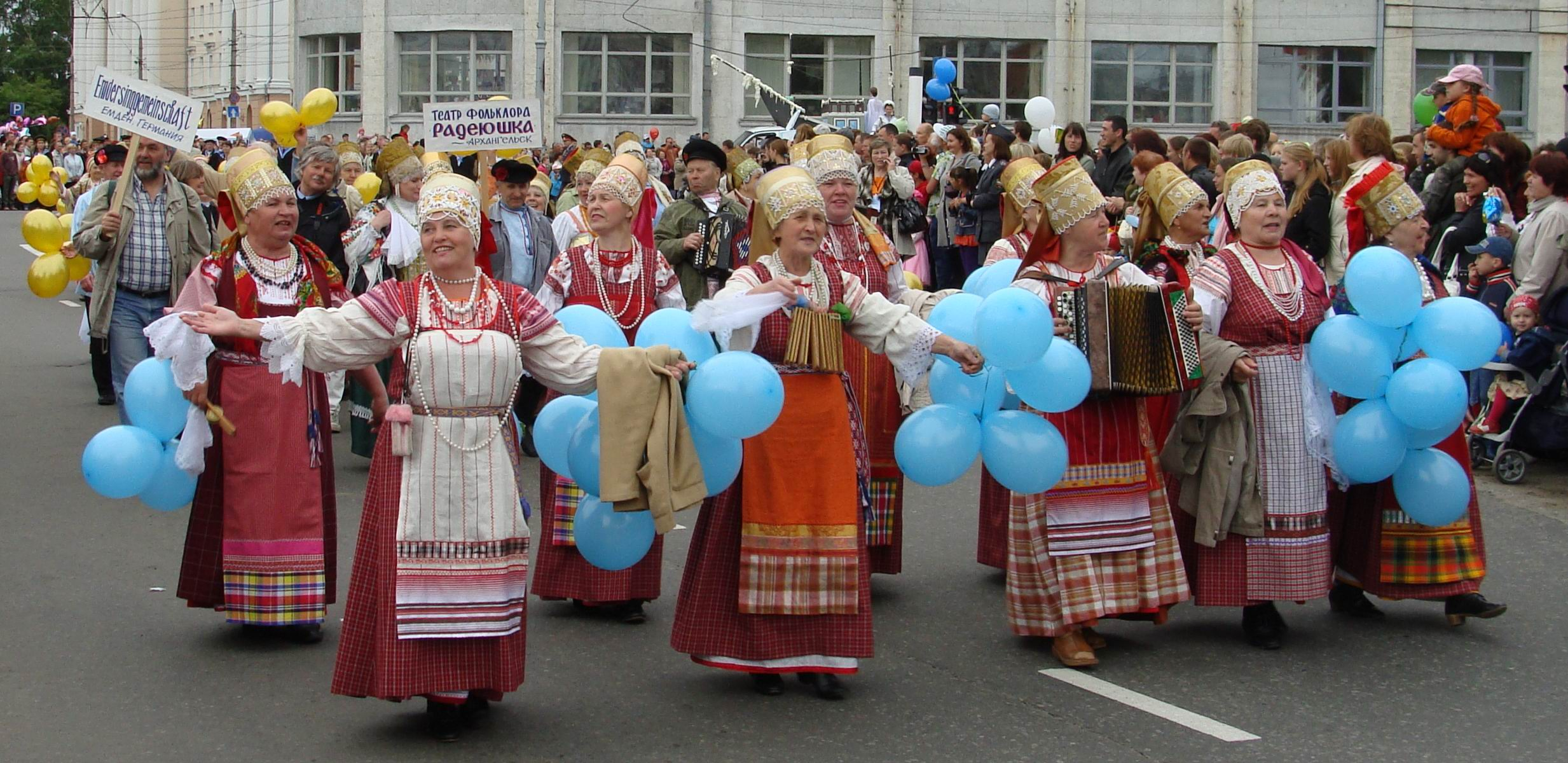 Парад посвященный юбилею города Архангельска. тысячи архангелогородцев собрались на площади Ленина перед зданием телецентра, чтобы посмотреть праздничное шествие. Участники парада в русских народных костюмах.